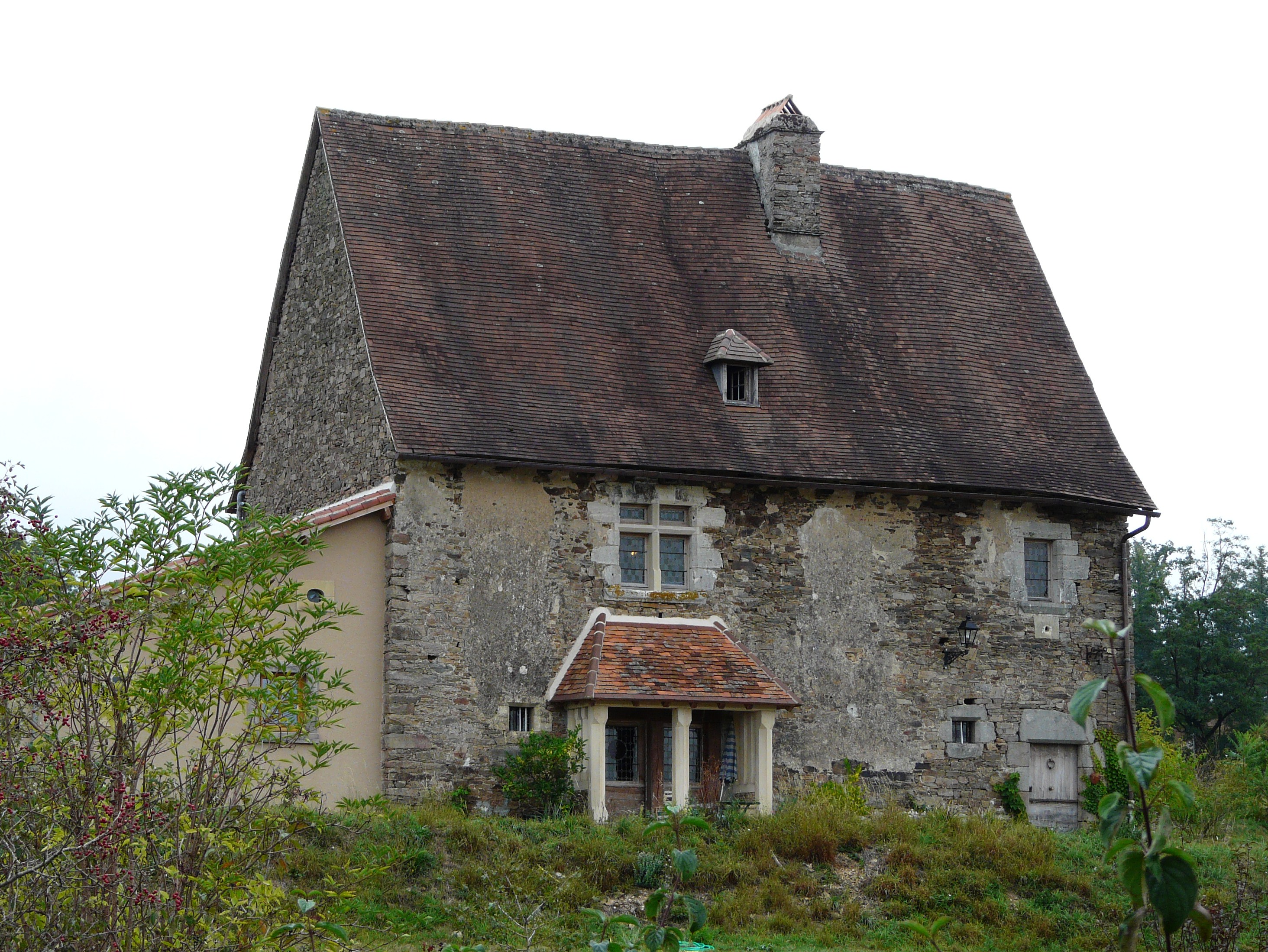 La maison templière, Saint-Paul-la-Roche, Dordogne, France